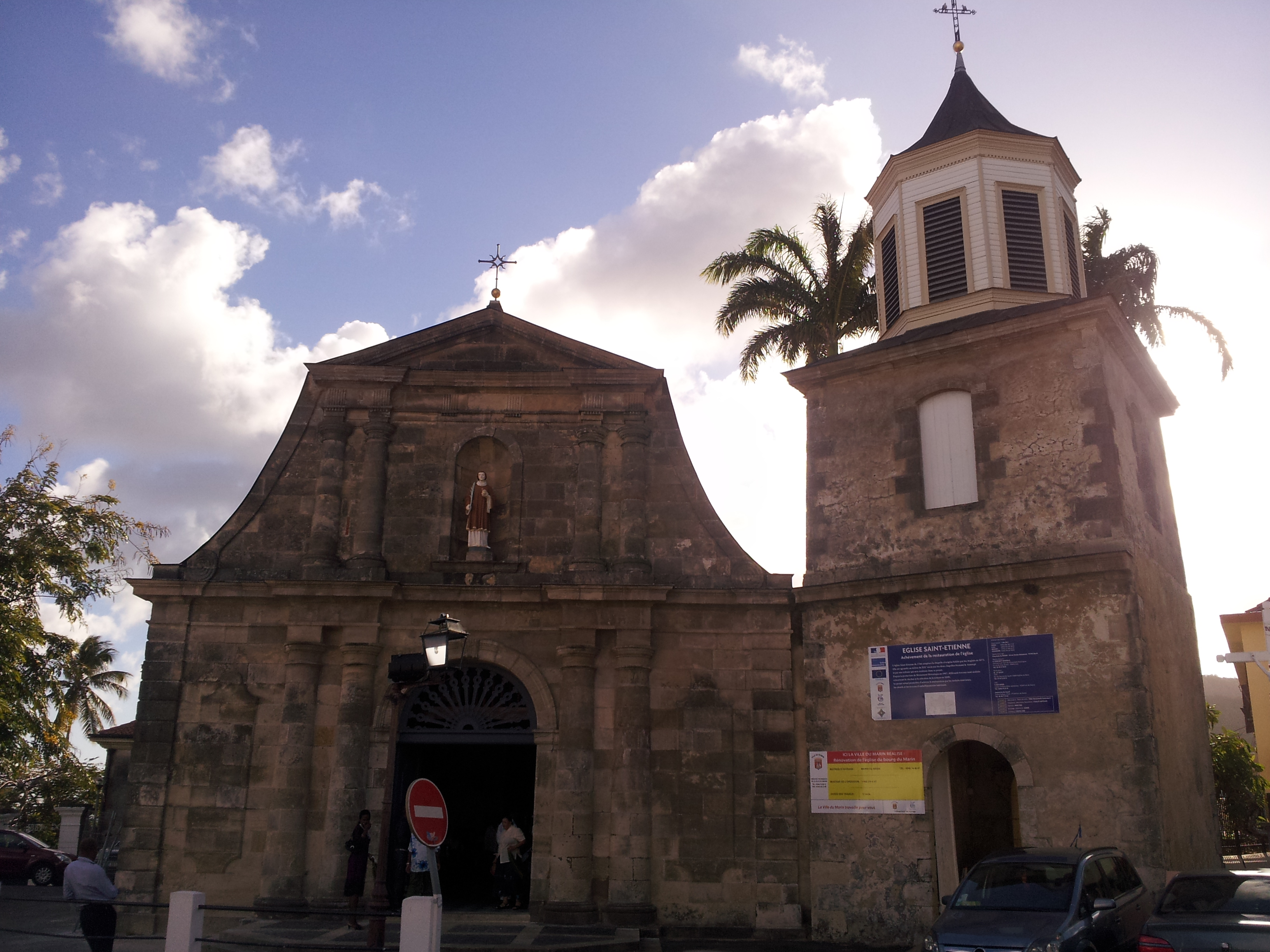 Façade de l'église Saint-Étienne du Marin